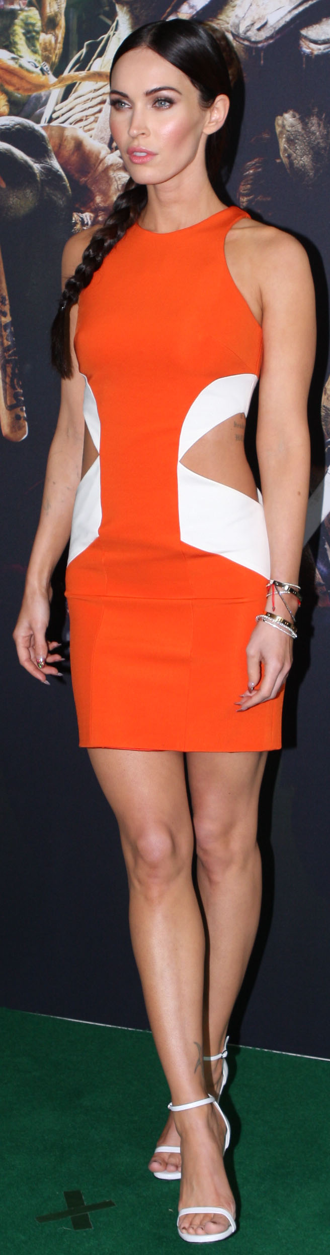 Megan Fox